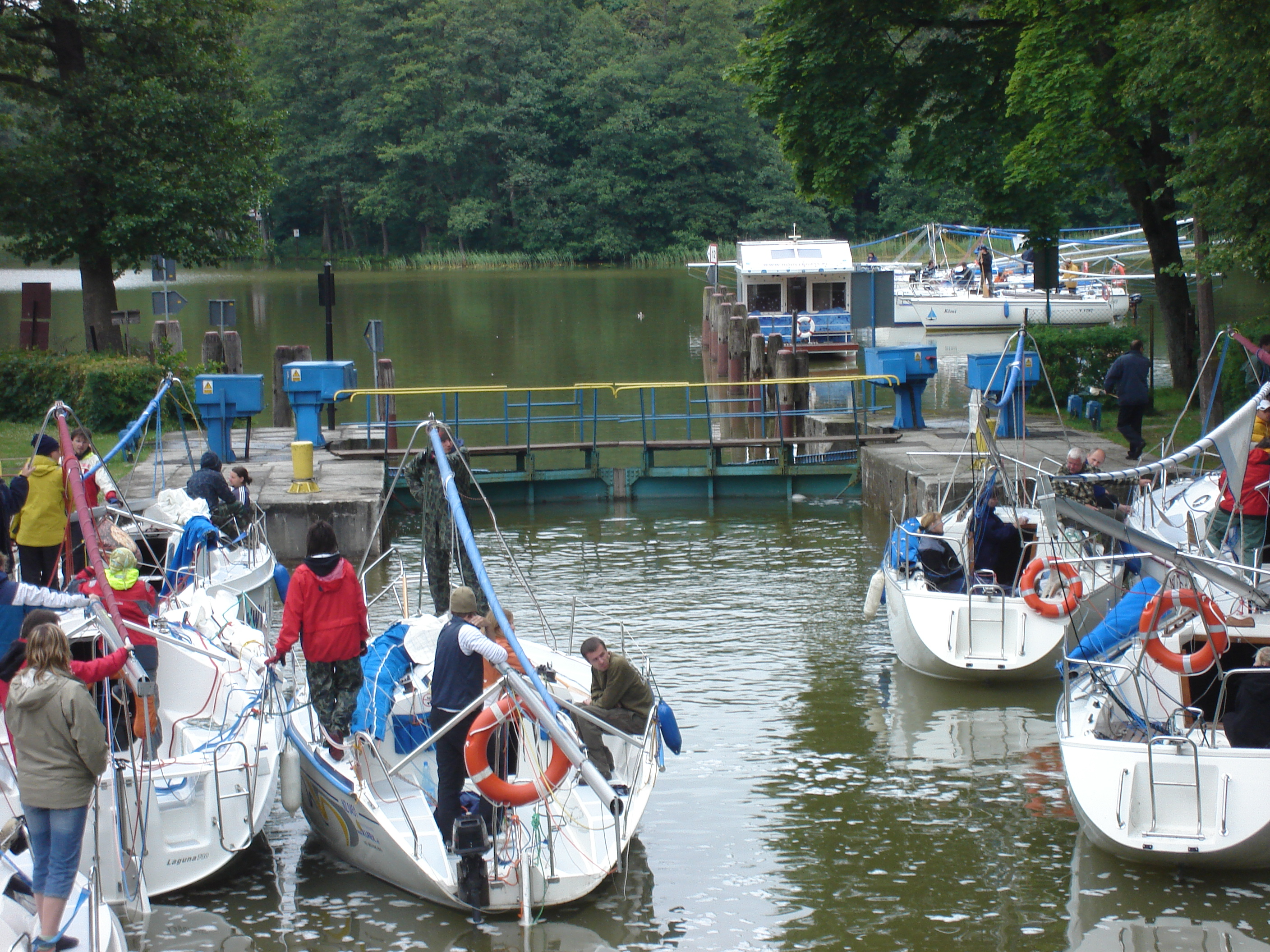 Śluza Guzianka. Wyrównany poziom wody.